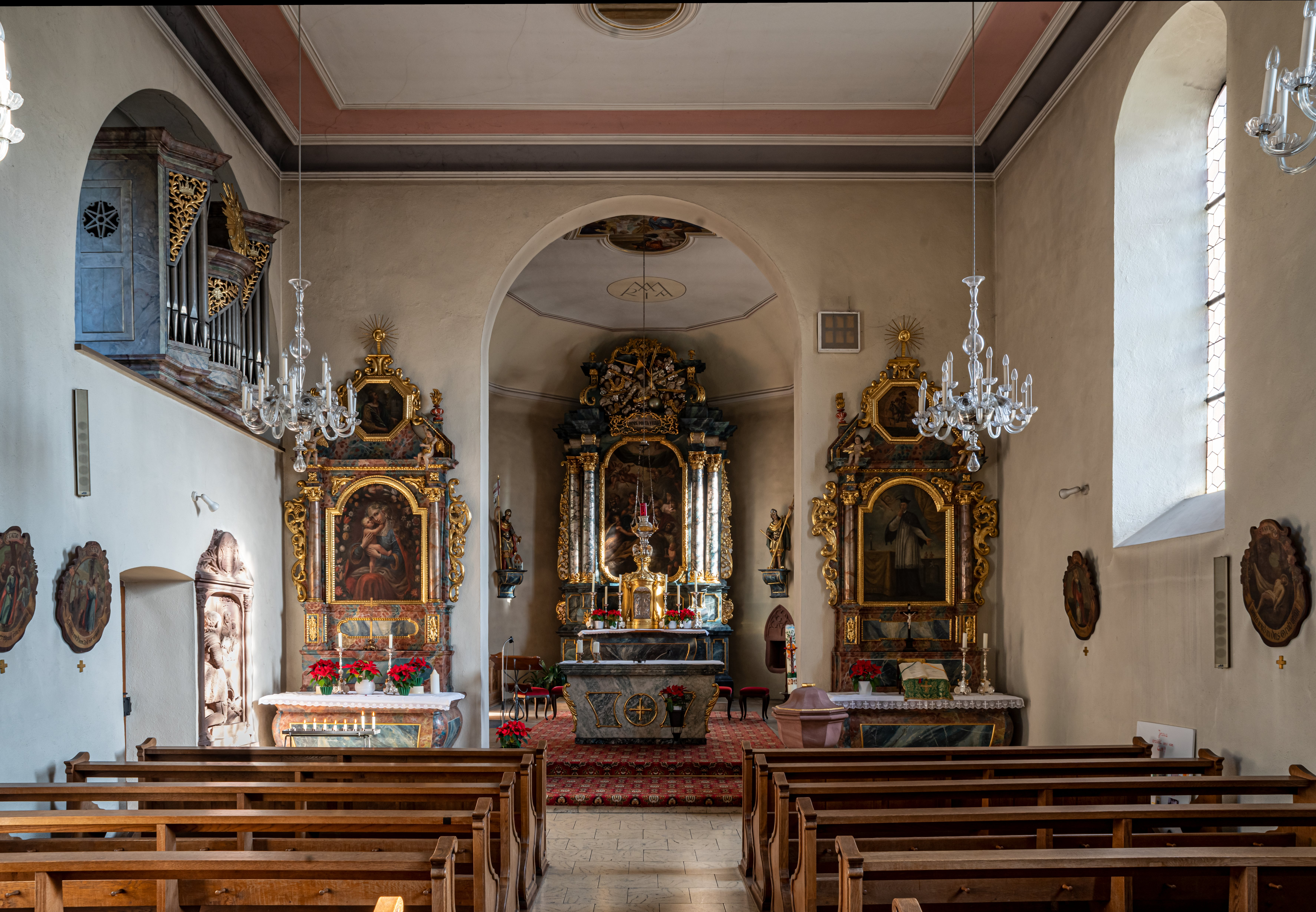 Bilder von St. Martin in Feldkirch